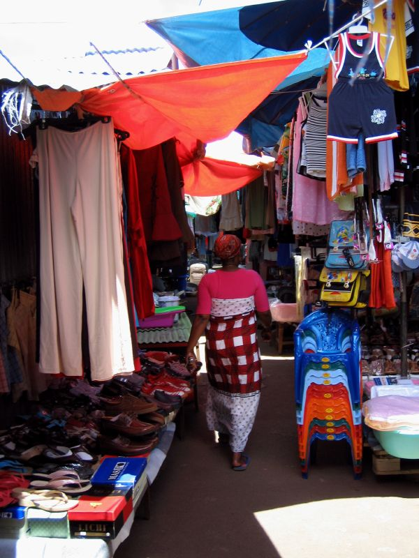 Marché de Mamoudzou, à Mayotte